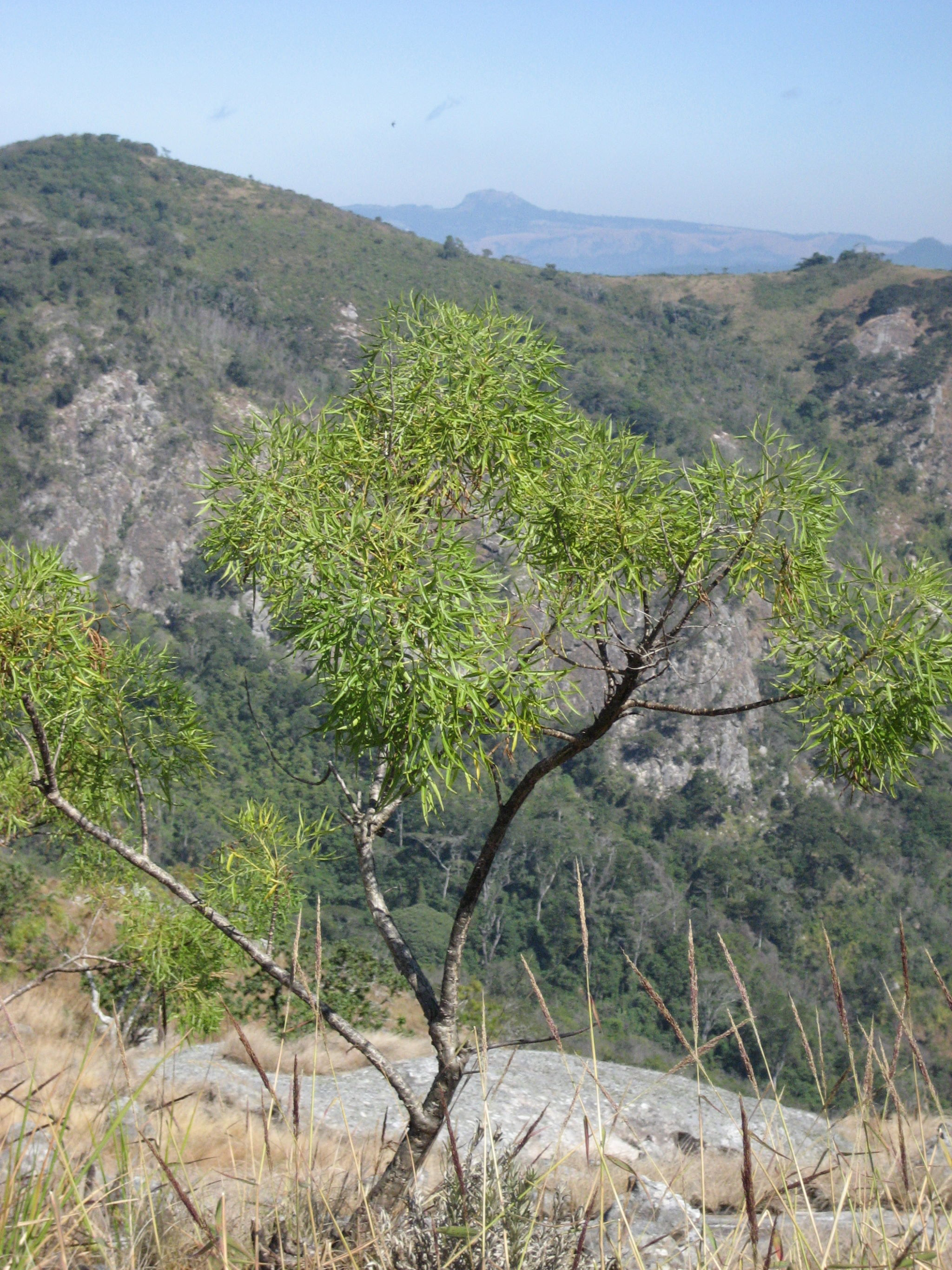 Heteromorpha arborescens var. montana